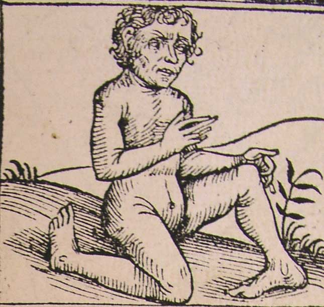 Reverse Feet